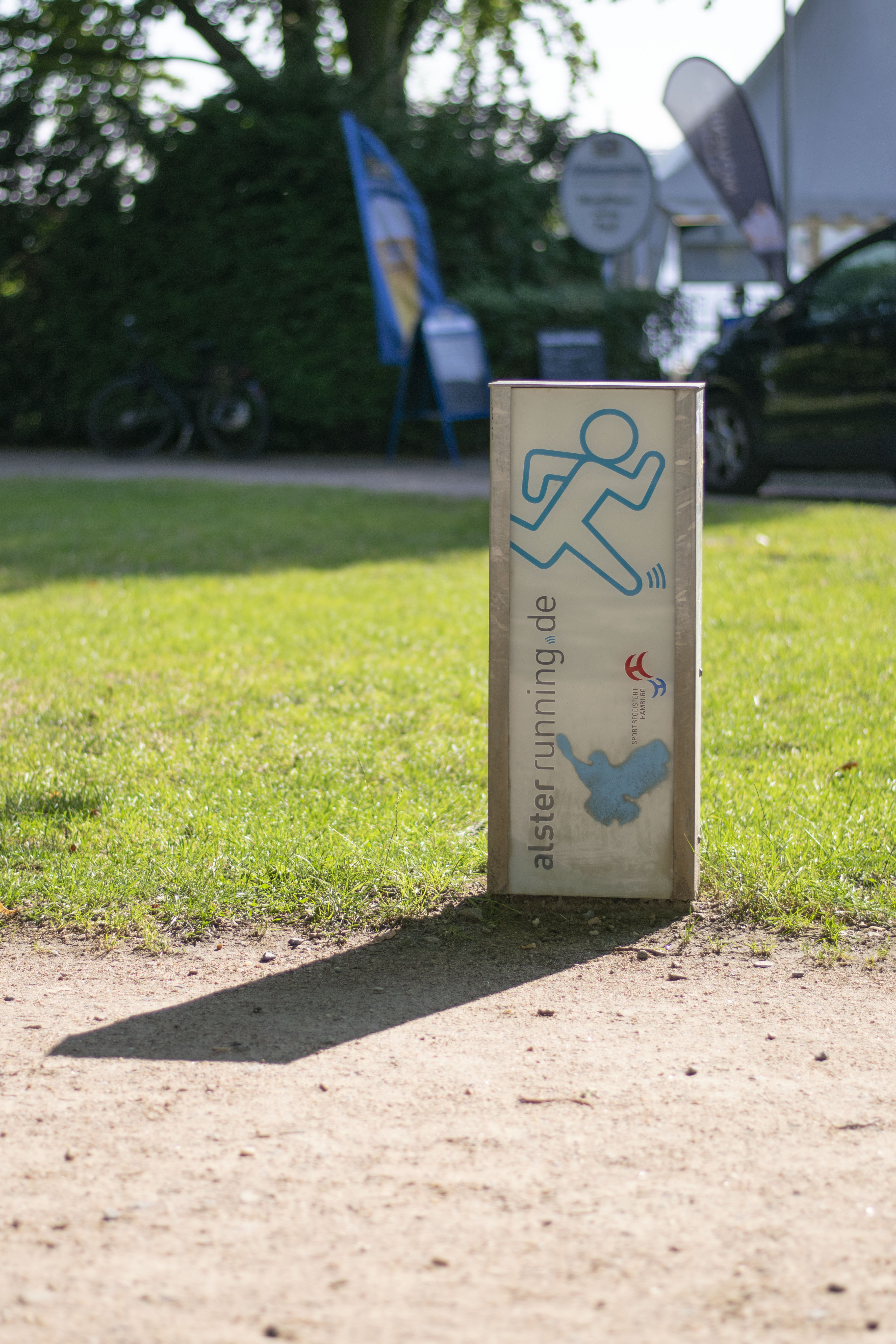 Messstation 4 "Schöne Aussicht"